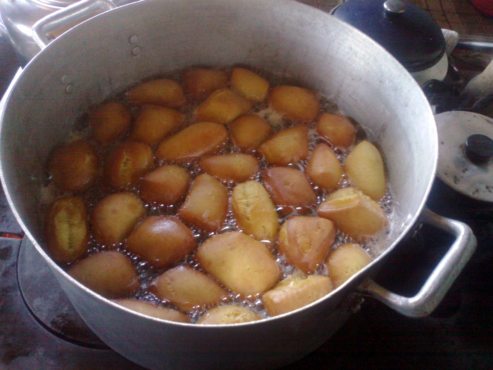 Sopaipillas preparadas durante un reitimiento en Quinched, Isla de Chiloé, Chiloé.